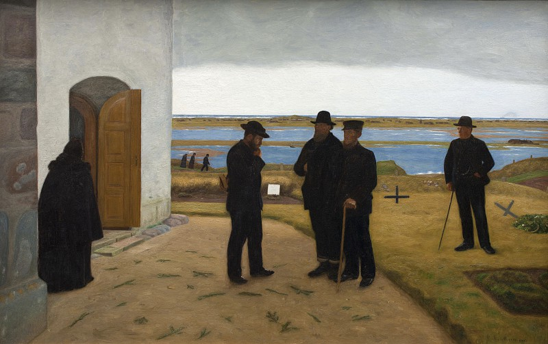 Люди у церкви